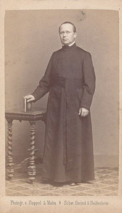 Diese Carte de Visite auf handgeschnittenem Trägerkarton und dem Aufdruck "Photogr. Boppel & Mahn, Schw. Gmünd & Heidenheim" zeigt als Atelieraufnahme einen katholischen Priester.